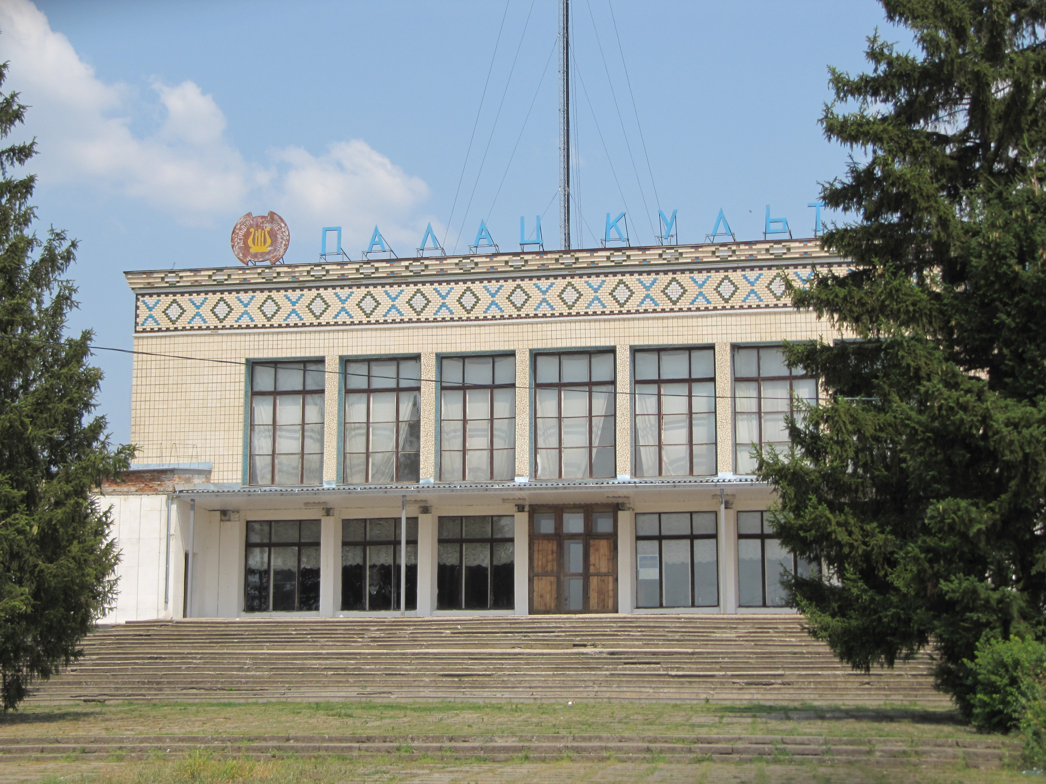 Вознесенський район, село Щербані, Палац Культури Миколаївська весна у Вікіпедії